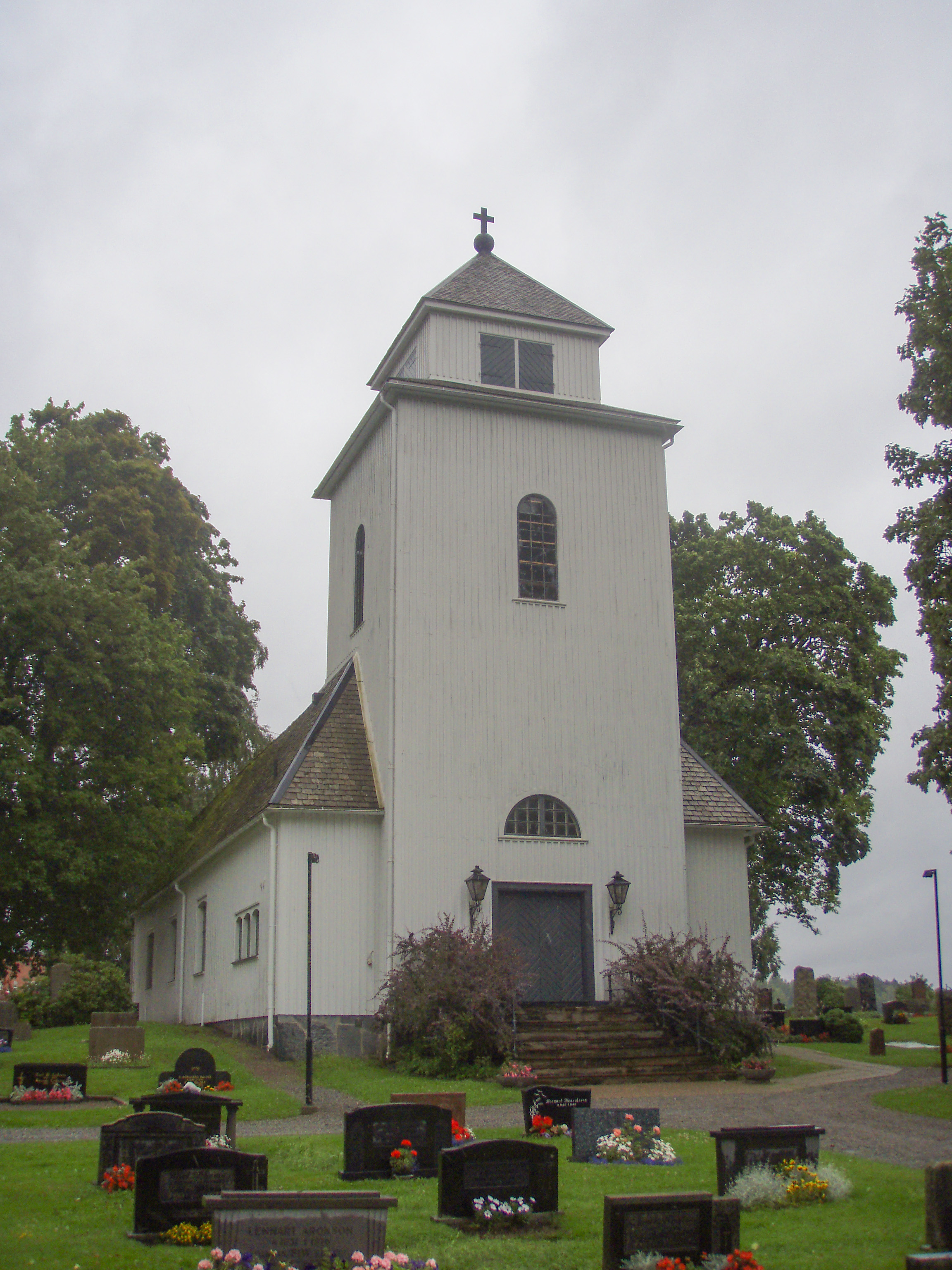 Billingsfors kyrka (Billingsfors 9:1)